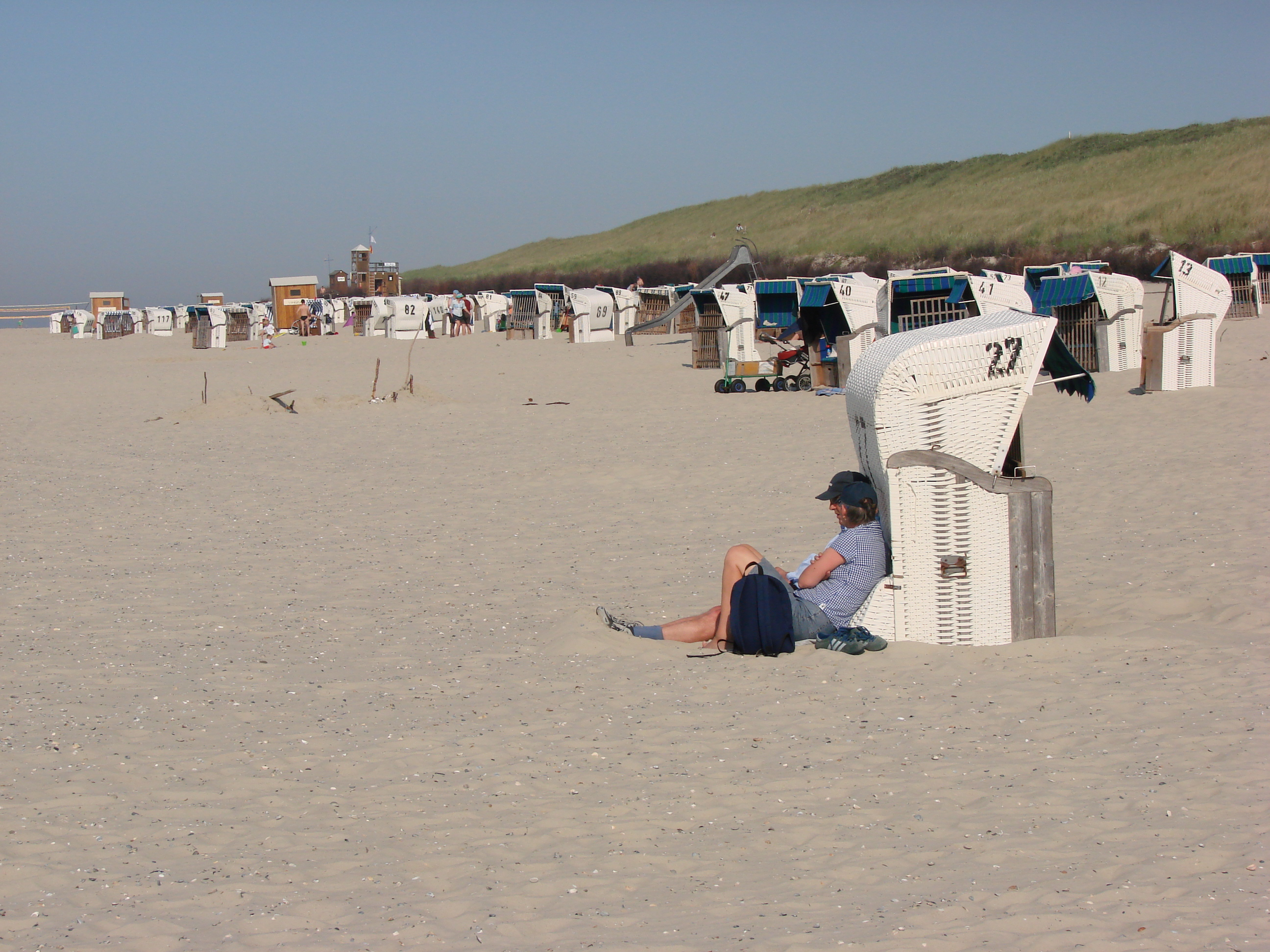 Spiekeroog, am Strand